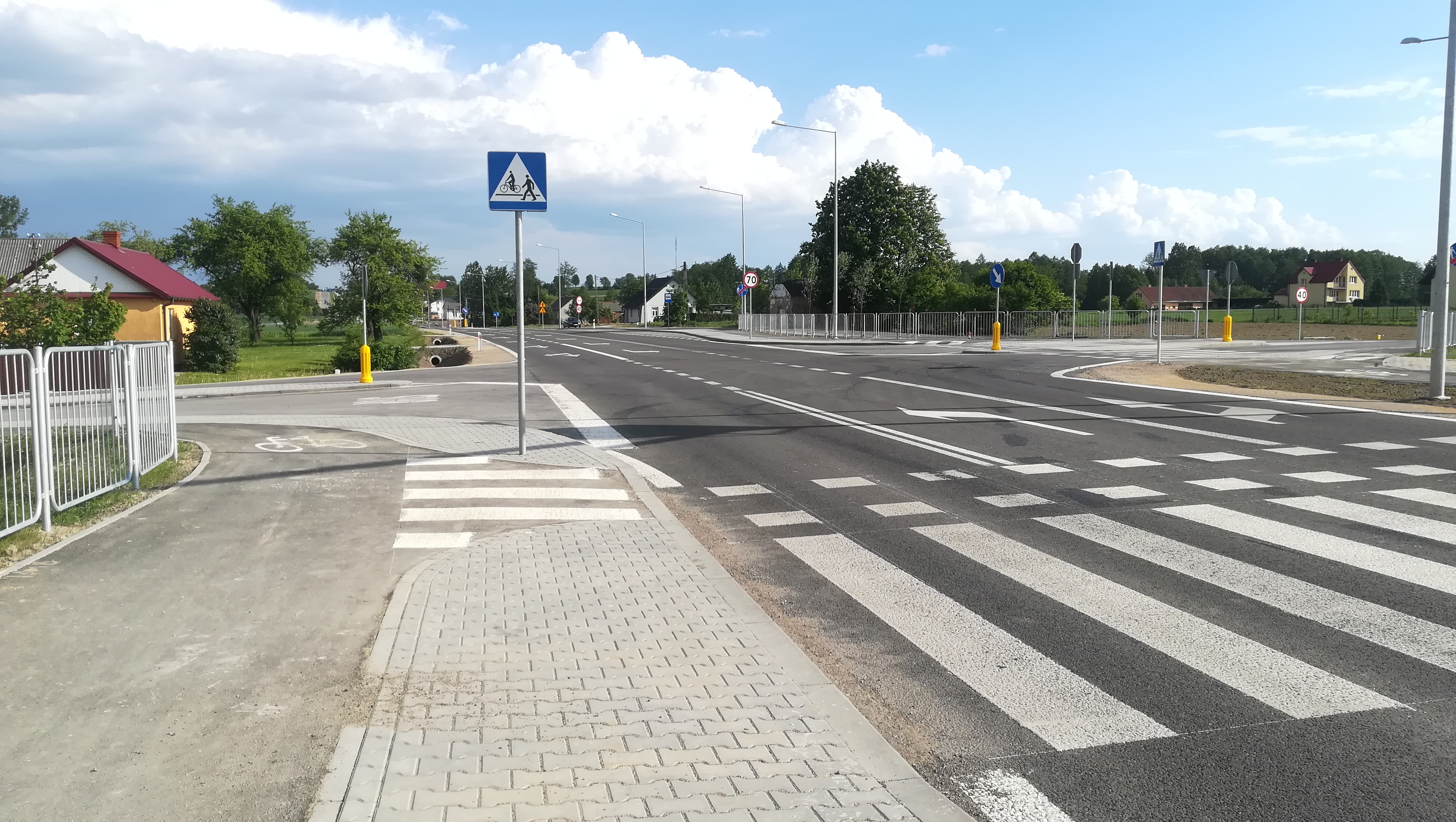 Skrzyżowanie z drogą powiatową na wyremontowanym odcinku drogi wojewódzkiej 835 w Piotrkowie Pierwszym.